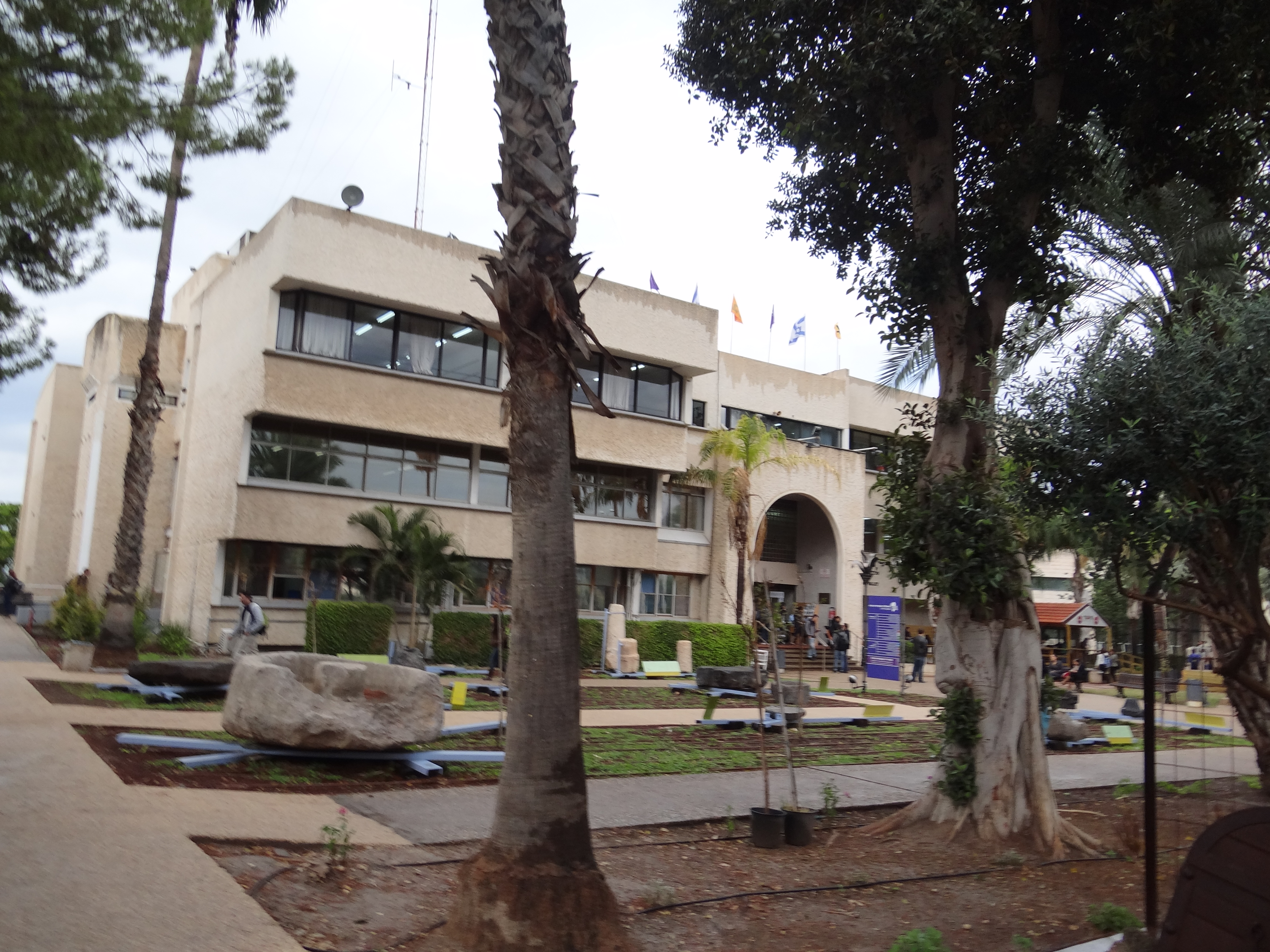 Kinneret College on the Sea of Galilee המכללה האקדמית כנרת היא מכללה באזור עמק הירדן שנוסדה בשנת 1965 כמוסד לימודים על תיכונים לתושבי סובב כנרת ועמק הירדן. המכללה נחשבת כשלוחה של אוניברסיטת בר אילן